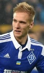 Лукаш Теодорчик - футболіст Динамо (Київ)